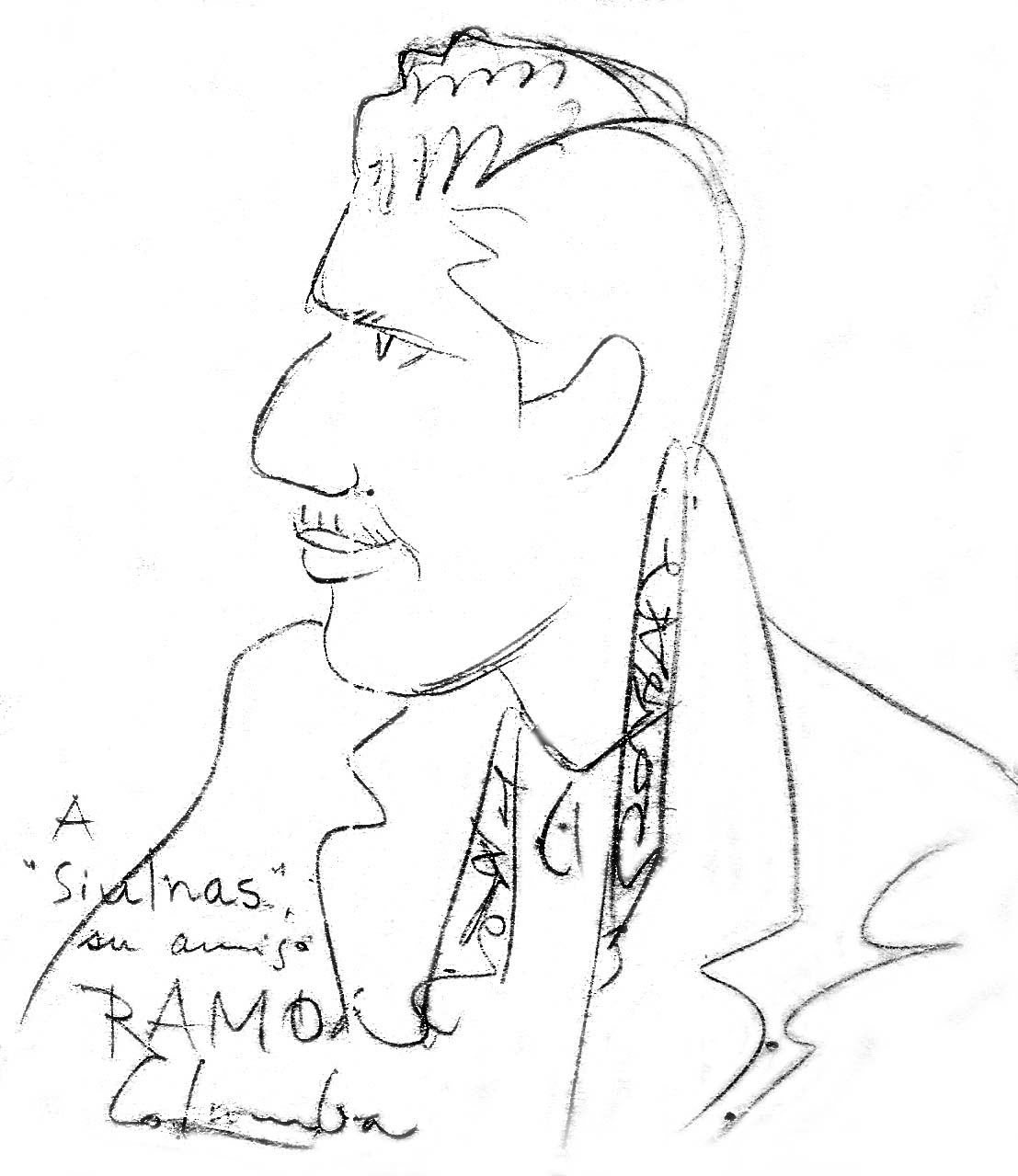 Siulnas, retratado por el maestro dibujante Ramón Columba.